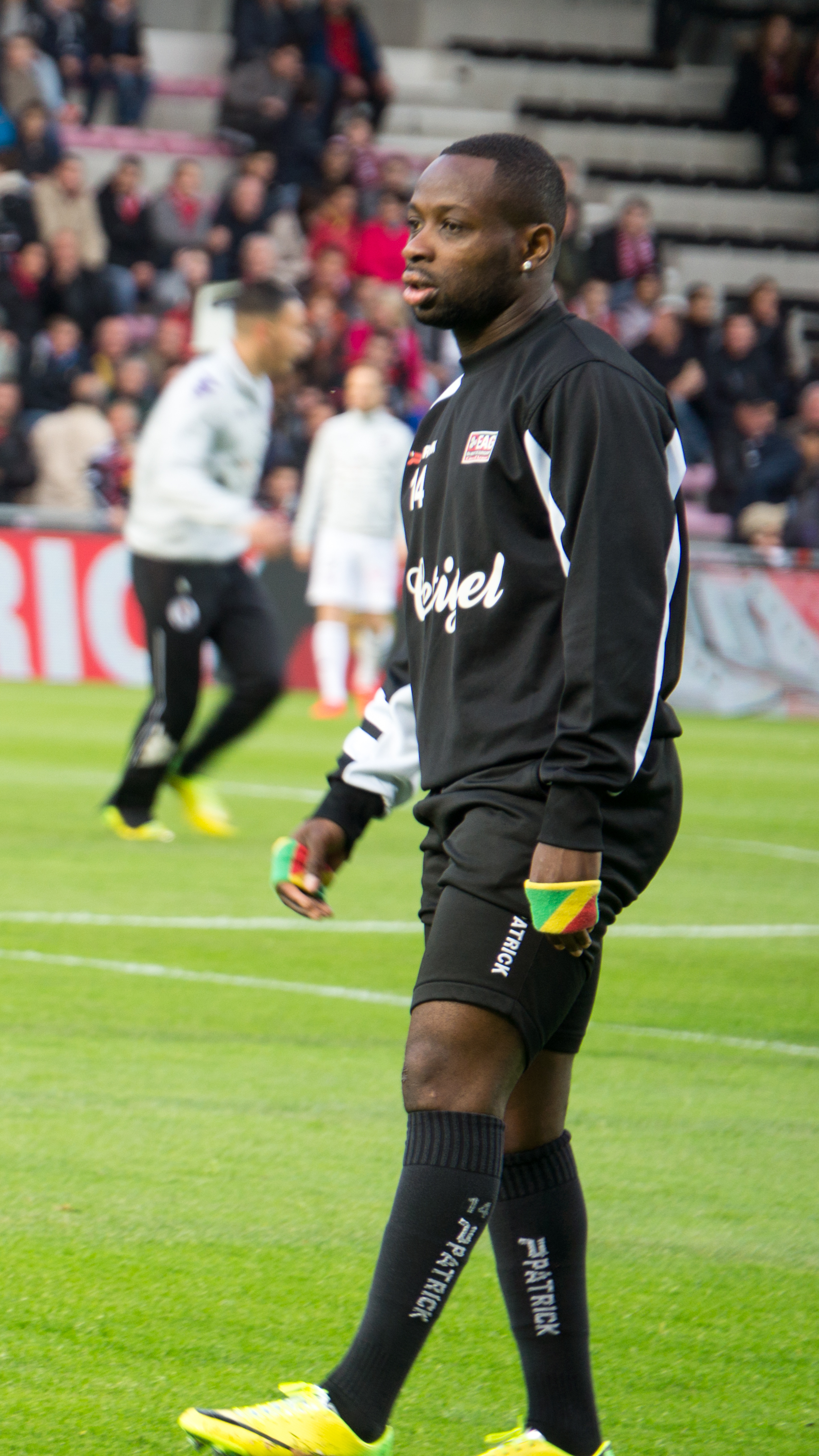 Guingamp-Toulouse le 10 mai 2014